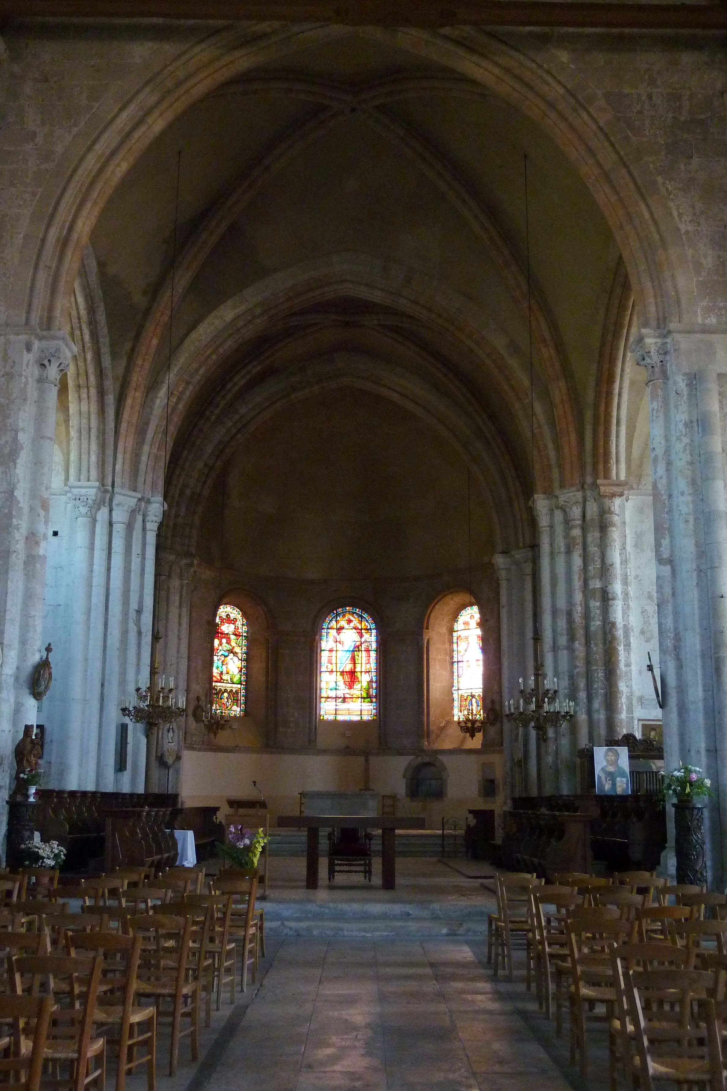 Katholische Kirche Notre-Dame de l'Assomption in Château-Landon, einer Gemeinde im Département Seine-et-Marne (Île-de-France), Innenraum mit Blick zum Chor